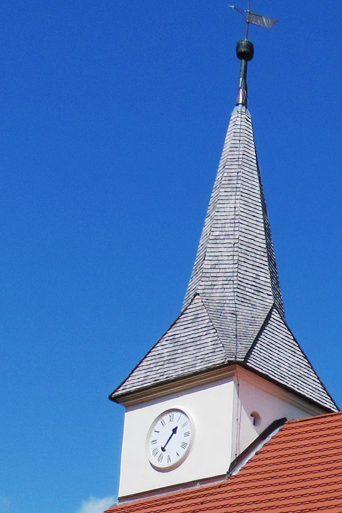 Turmuhr der Kapelle Ludwigsburg (MV) mit nur einem Zeiger